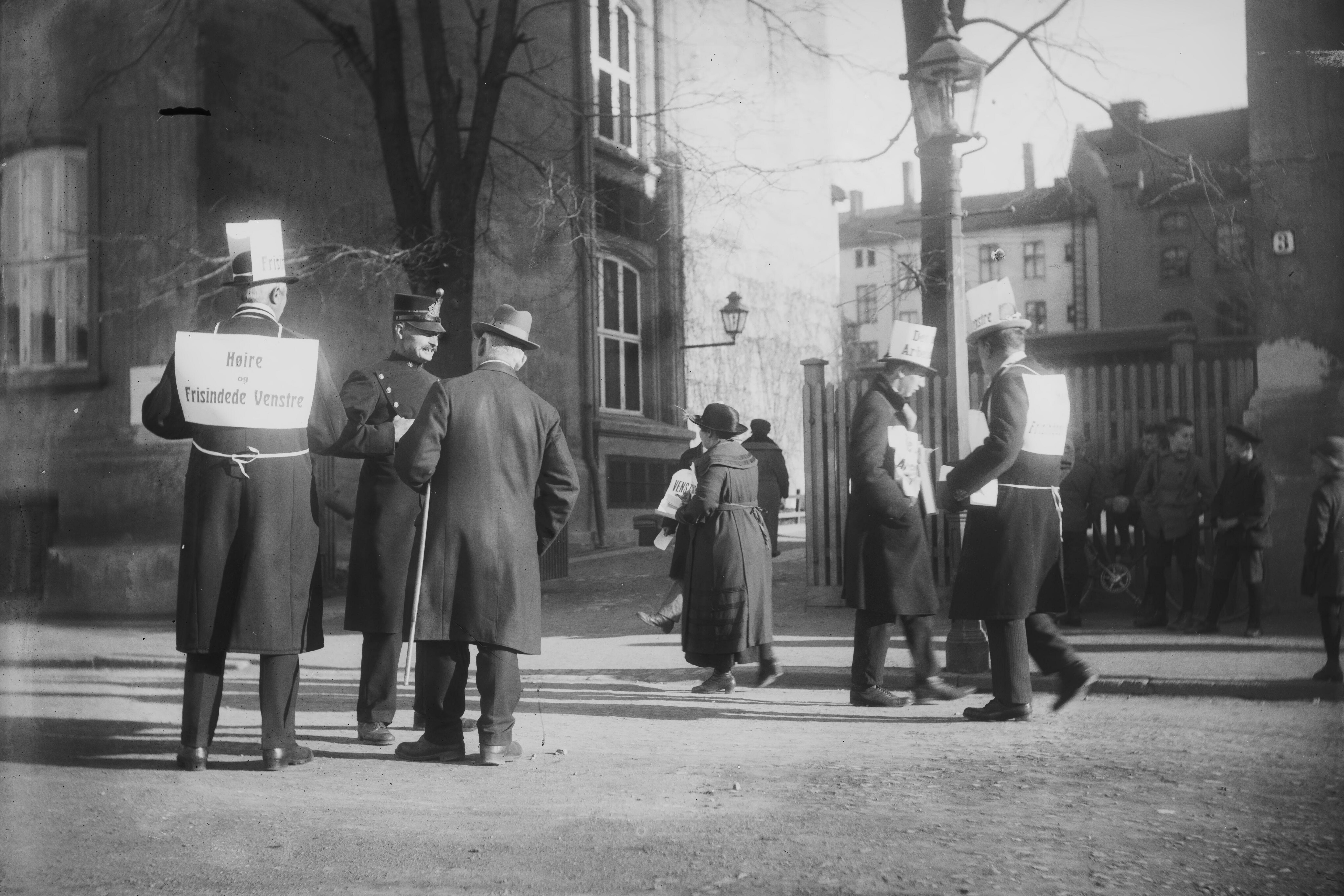 Bildet er hentet fra Nasjonalbibliotekets bildesamling. Anmerkninger til bildet var: Påskrift arkivark: Valgdagen 1921 Arkivnummer: 411 Oslo, Oslo, Oslo